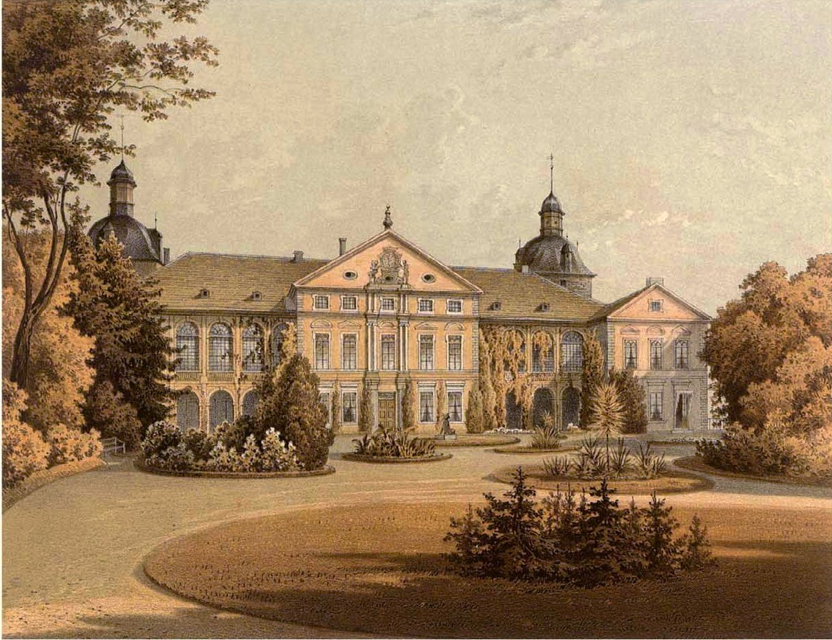 Schloss Hundisburg, Lithografie aus dem 19. Jahrhundert